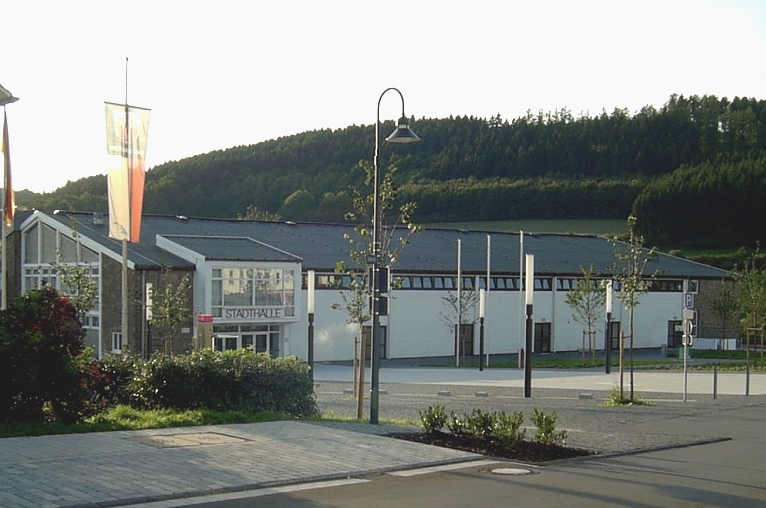 Schmallenberg, Stadthalle (Fassungsvermögen 1.500 Sitzplätze bzw. 2.500 Stehplätze), Germany.